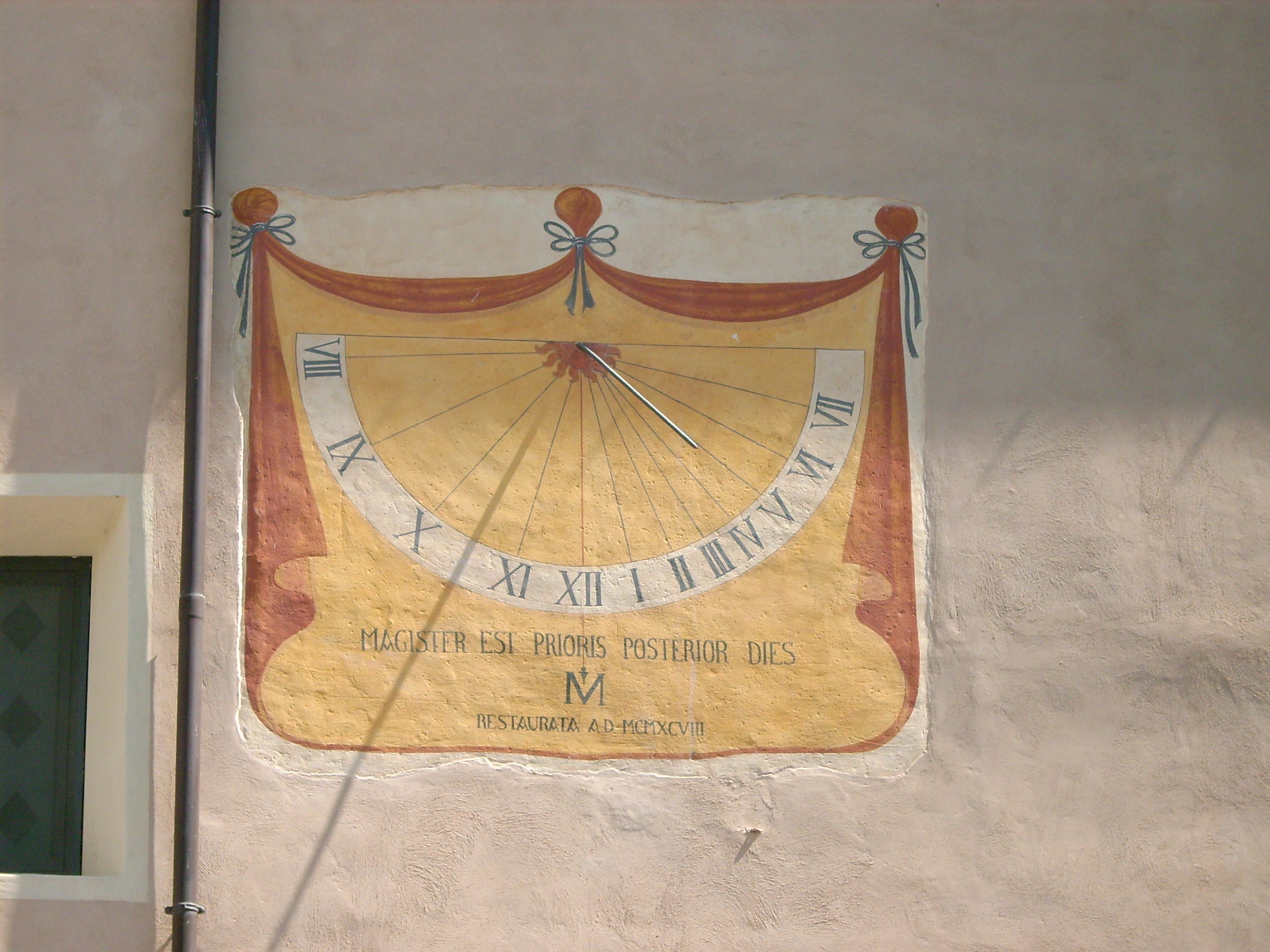 Meridiana presso Erli, Liguria, Italia